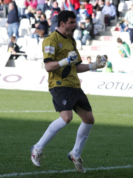 Raul Navas, portero del Córdoba CF la temporada 2009/10 en la Liga Adelante.